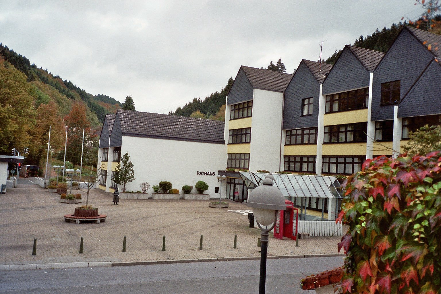 Rathaus von Schalksmühle, Deutschland